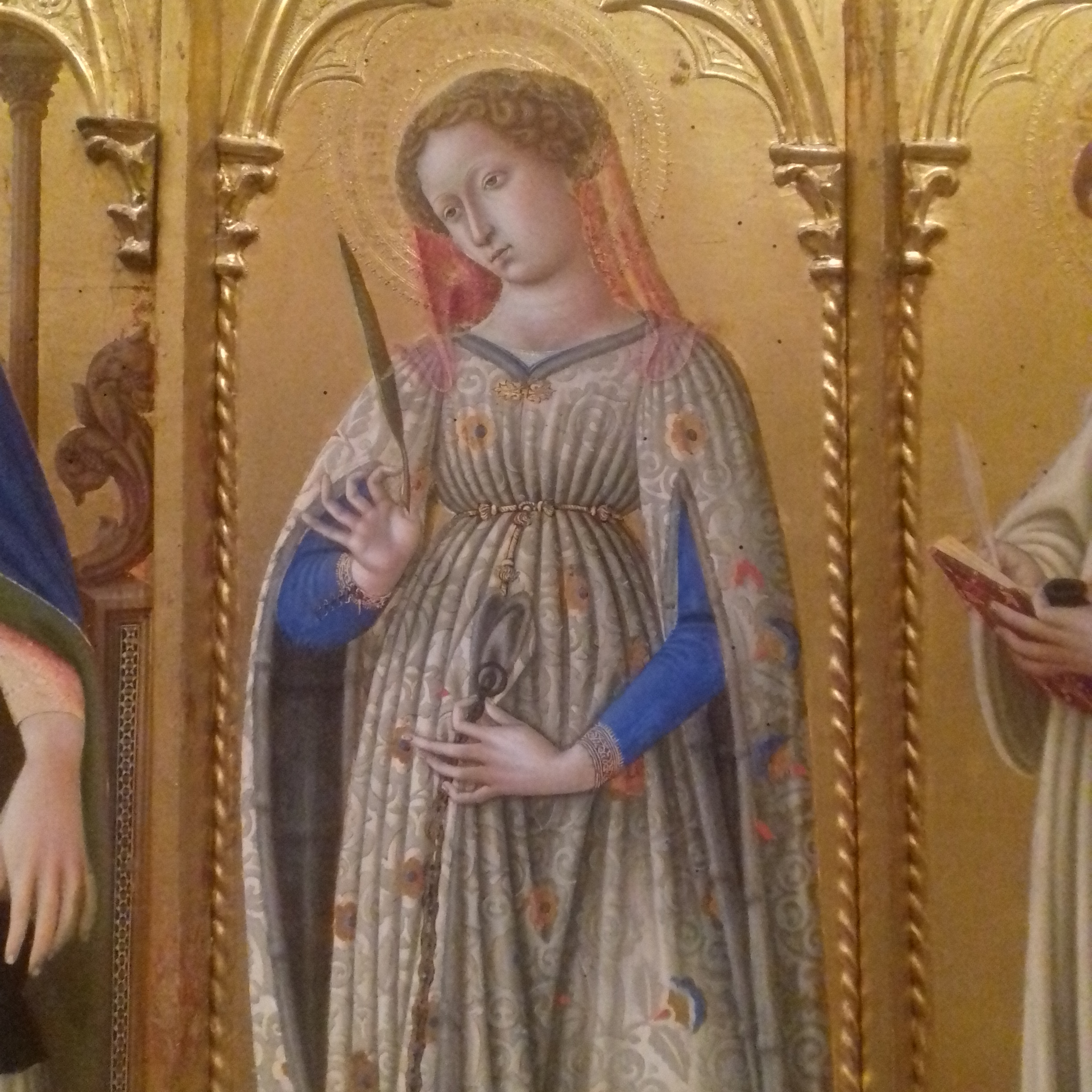 Polittico di Perugia di Domenico di Bartolo, particolare2